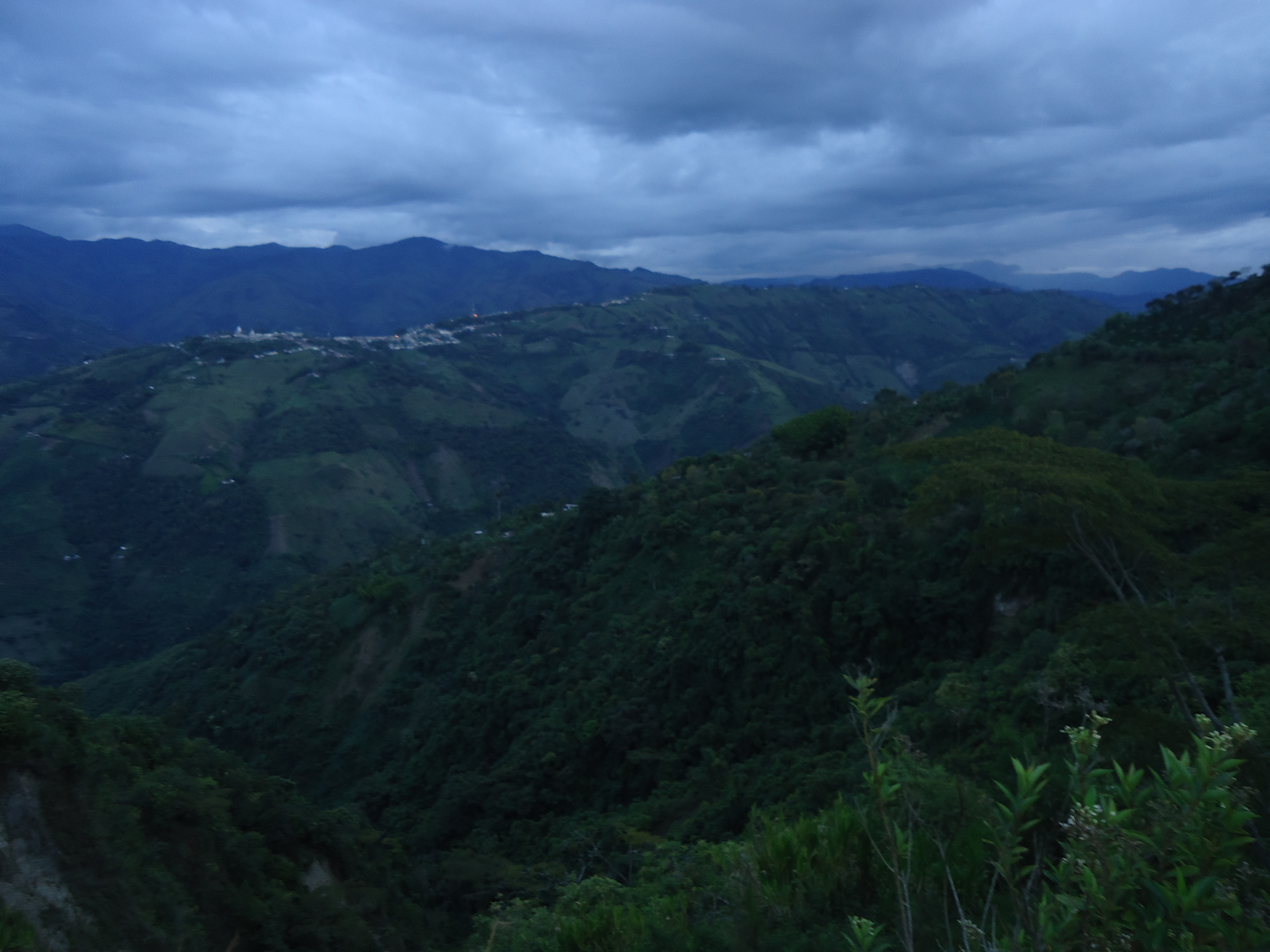 desde la vereda la avispa